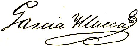 Imagen extraida del libro de Vicente Riva Palacio, Julio Zárate (1880) "México a través de los siglos" Tomo III: "La guerra de independencia" (1808 - 1821)